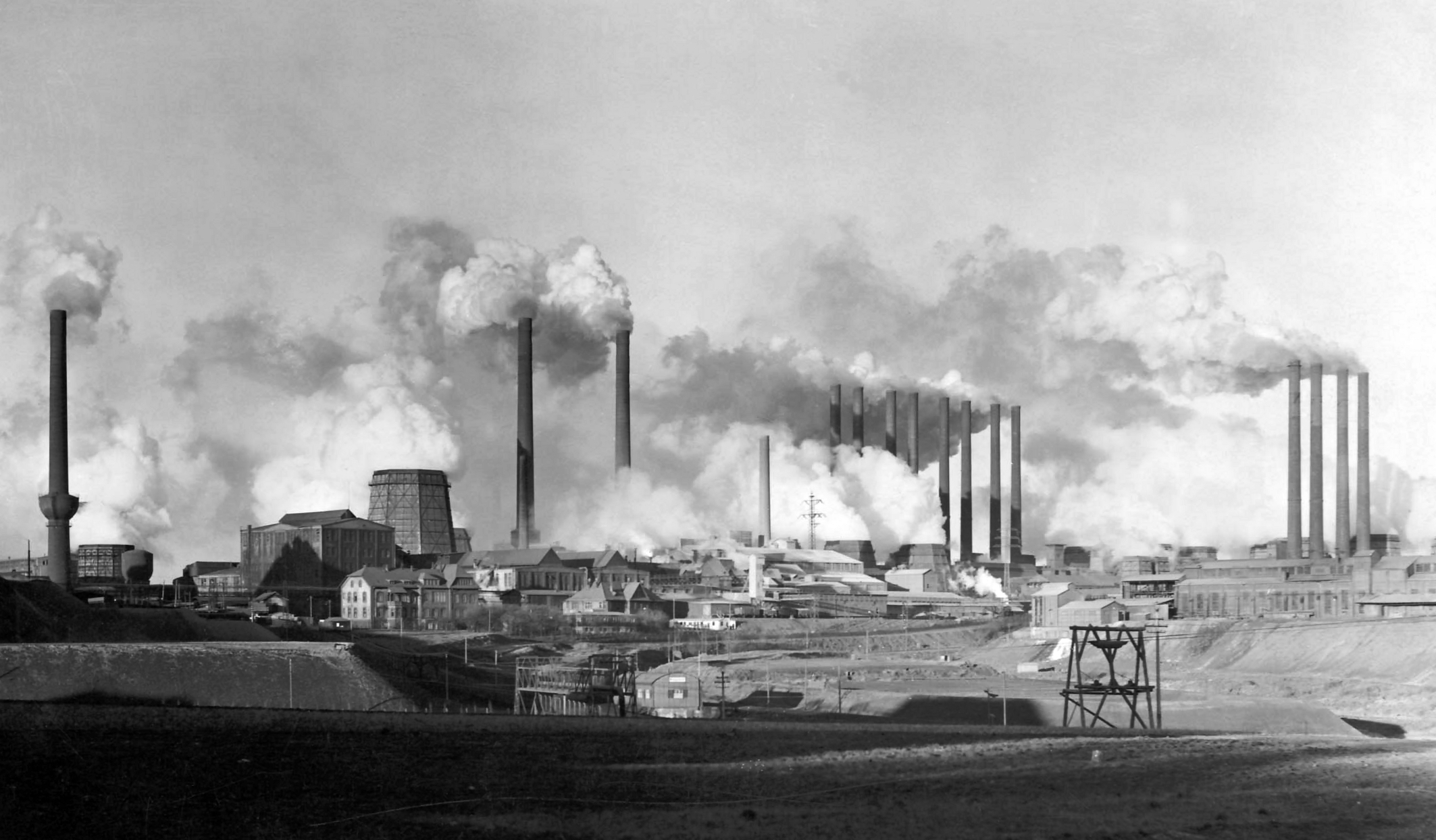 Panorama Chemiepark Knapsack, Huerth, Germany